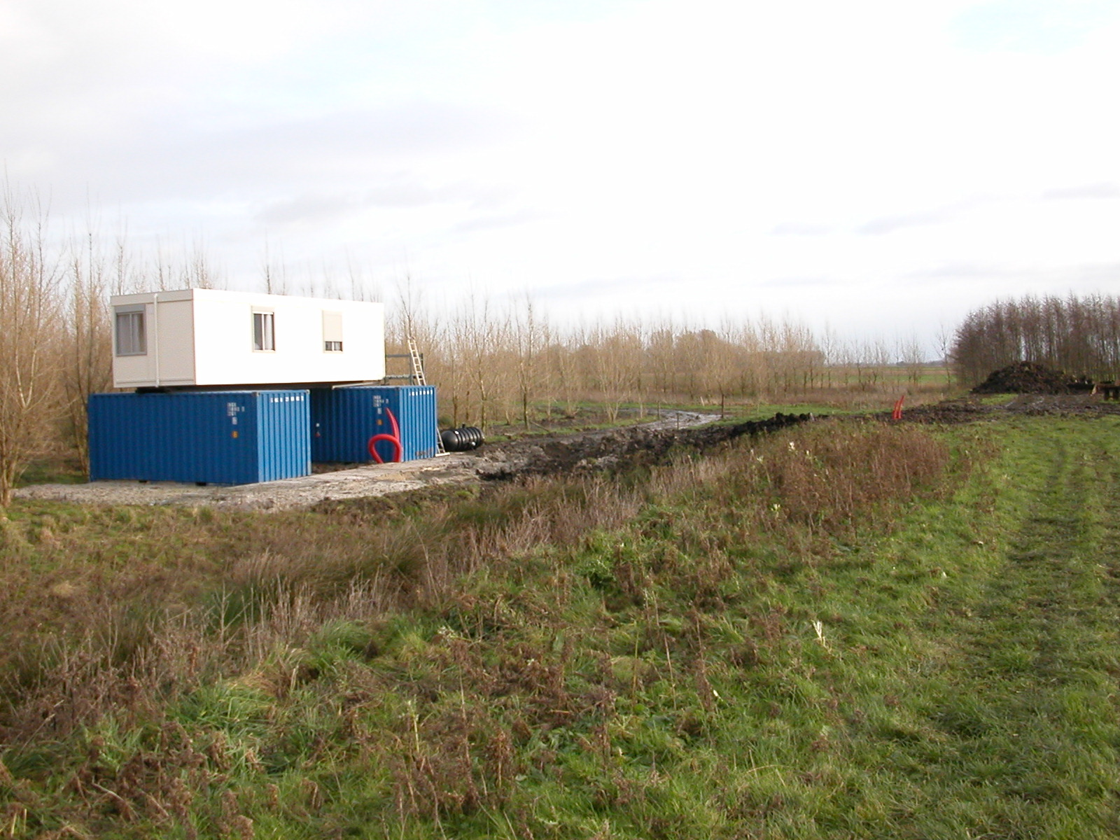 De observatiepost (in aanbouw) op het IJkdijkterrein. Hieruit worden experimenten met dijken gevolgd - niet alleen visueel, maar ook via sensortechnologie.